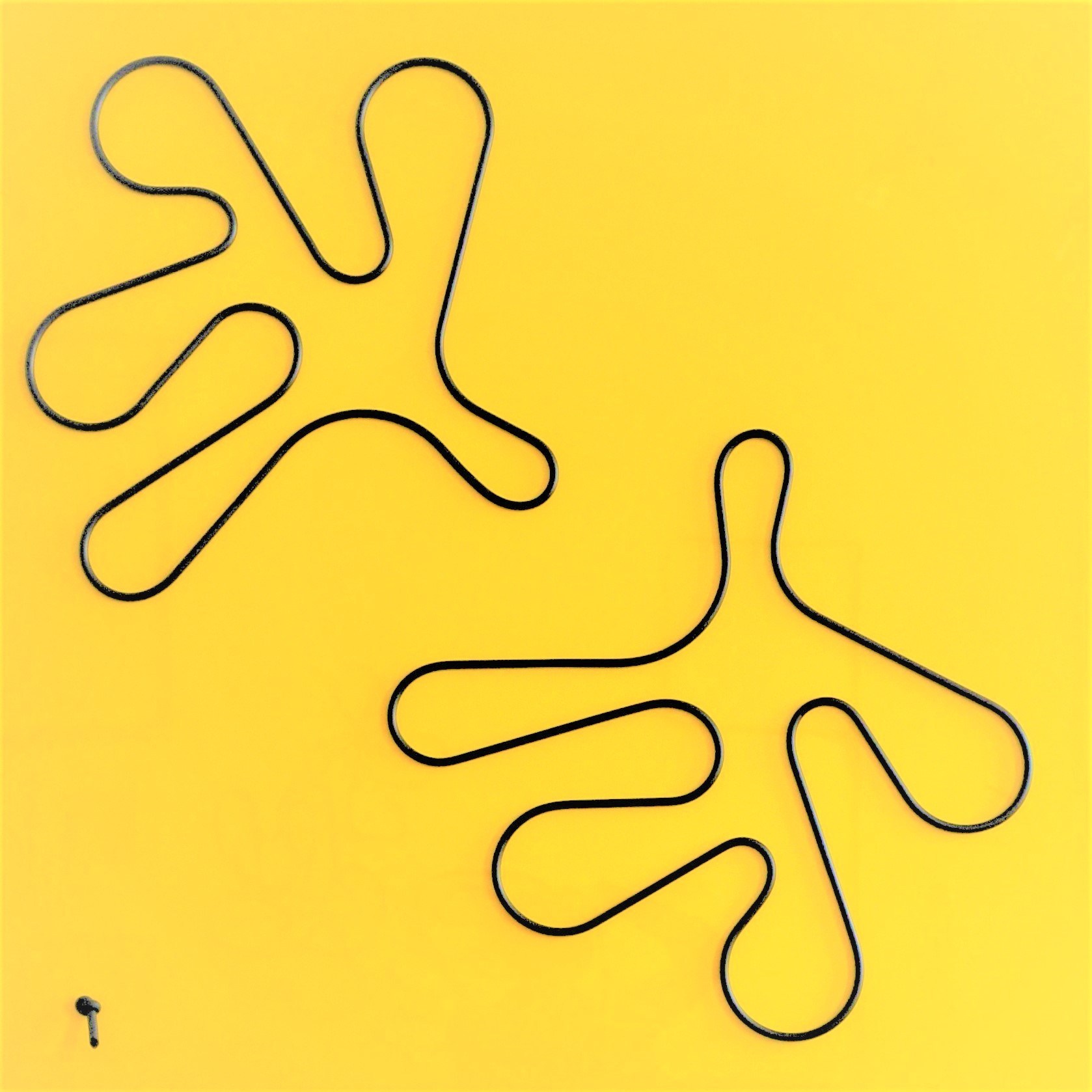 Judith P. Fischer: together (im Rapsfeld), 2019. Stahl und Rundstahl lackiert. 100 × 100 × 3,8 cm